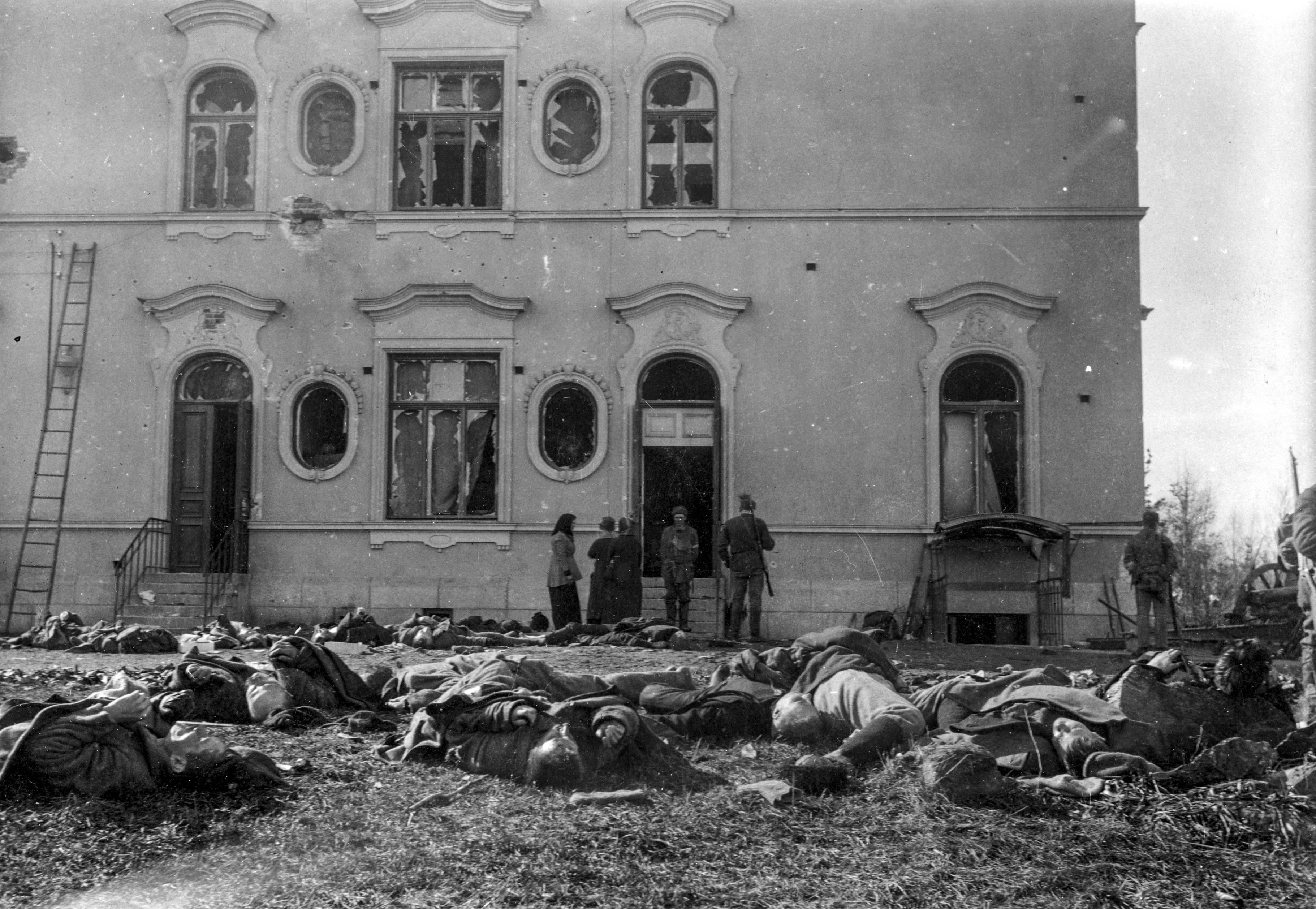 Etualalla todennäköisesti kaatuneita Melinin komppanian miehiä, taustalla teloitettuja punaisia. CC-BY Tampere 1918, kuvaaja tuntematon, Vapriikin kuva-arkisto. Finnish Civil War 1918, Photographer unknown, Vapriikki Photo Archives.